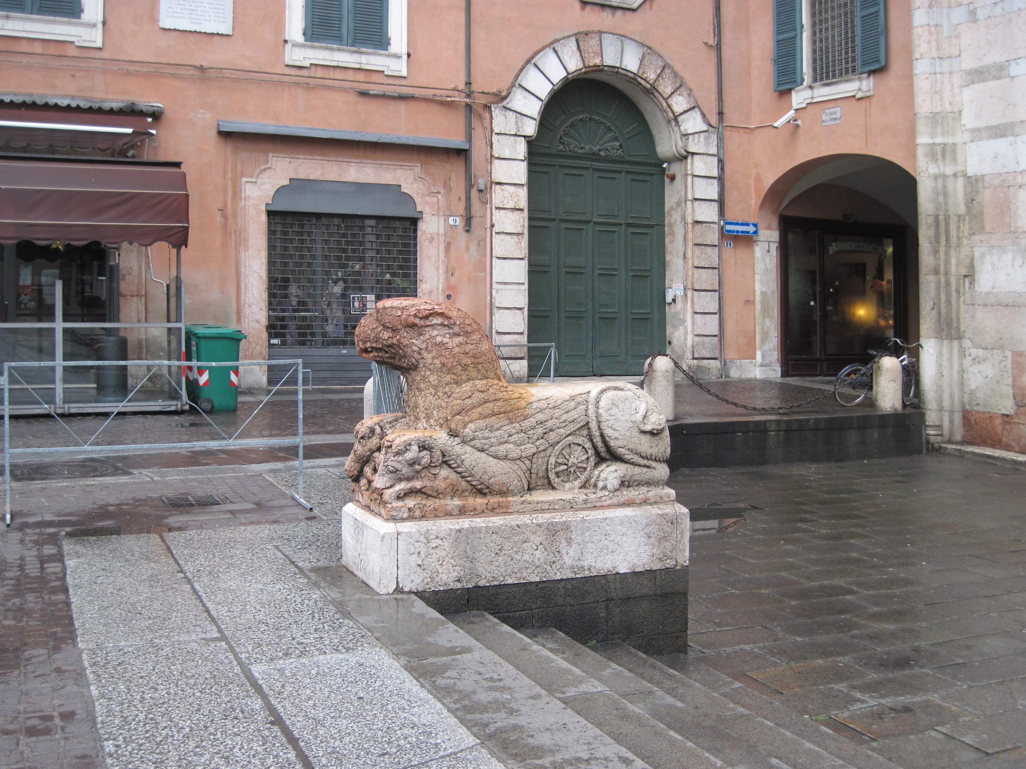 Piazza Duomo Ferrara - Angolo Palazzo Arcivescovile e Cattedrale di San Giorgio